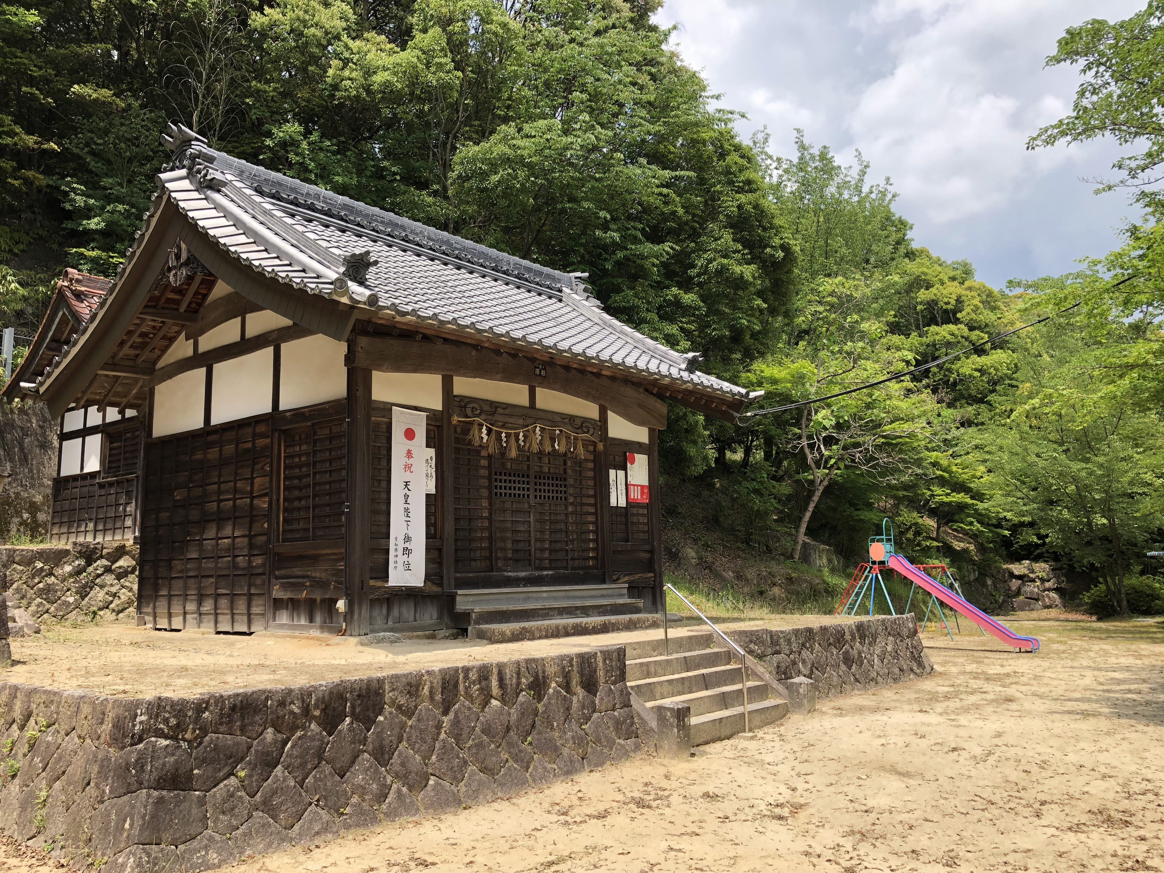 岩谷観音（岡崎市岩中町）